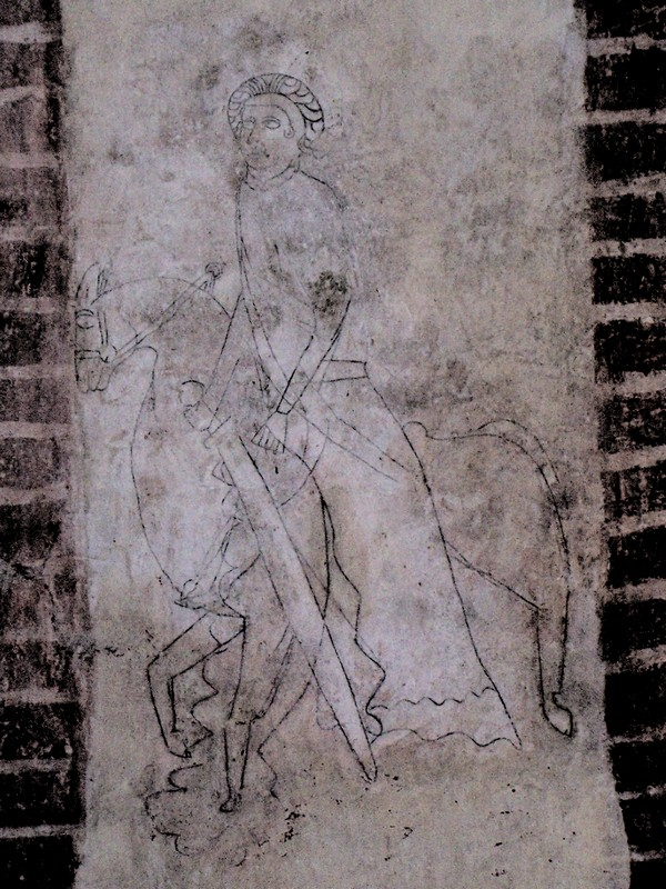 Kirche in Frauenmark, Landkreis Parchim: Die älteste Darstellung eines Ritters in Mecklenburg-Vorpommern, vermutlich der Stifter, Ritter von Dragun (oder Dargun?)